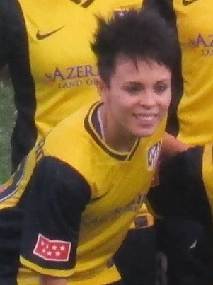 Atletico de Madrid Feminas